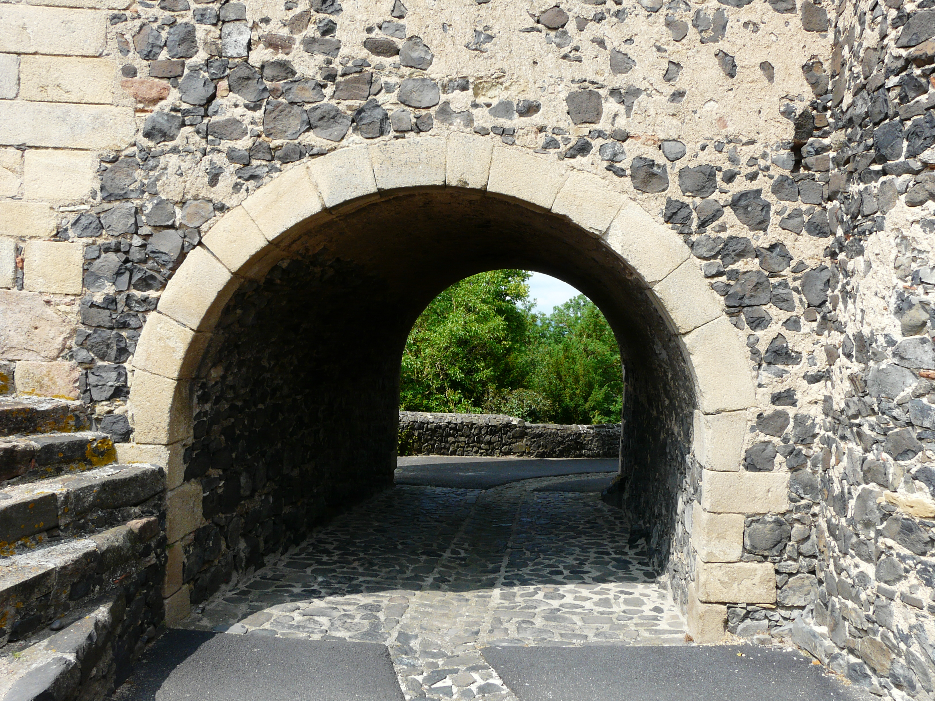 Passage sous le clocher de l'église Saint-Maurice, Usson, Puy-de-Dôme, France.